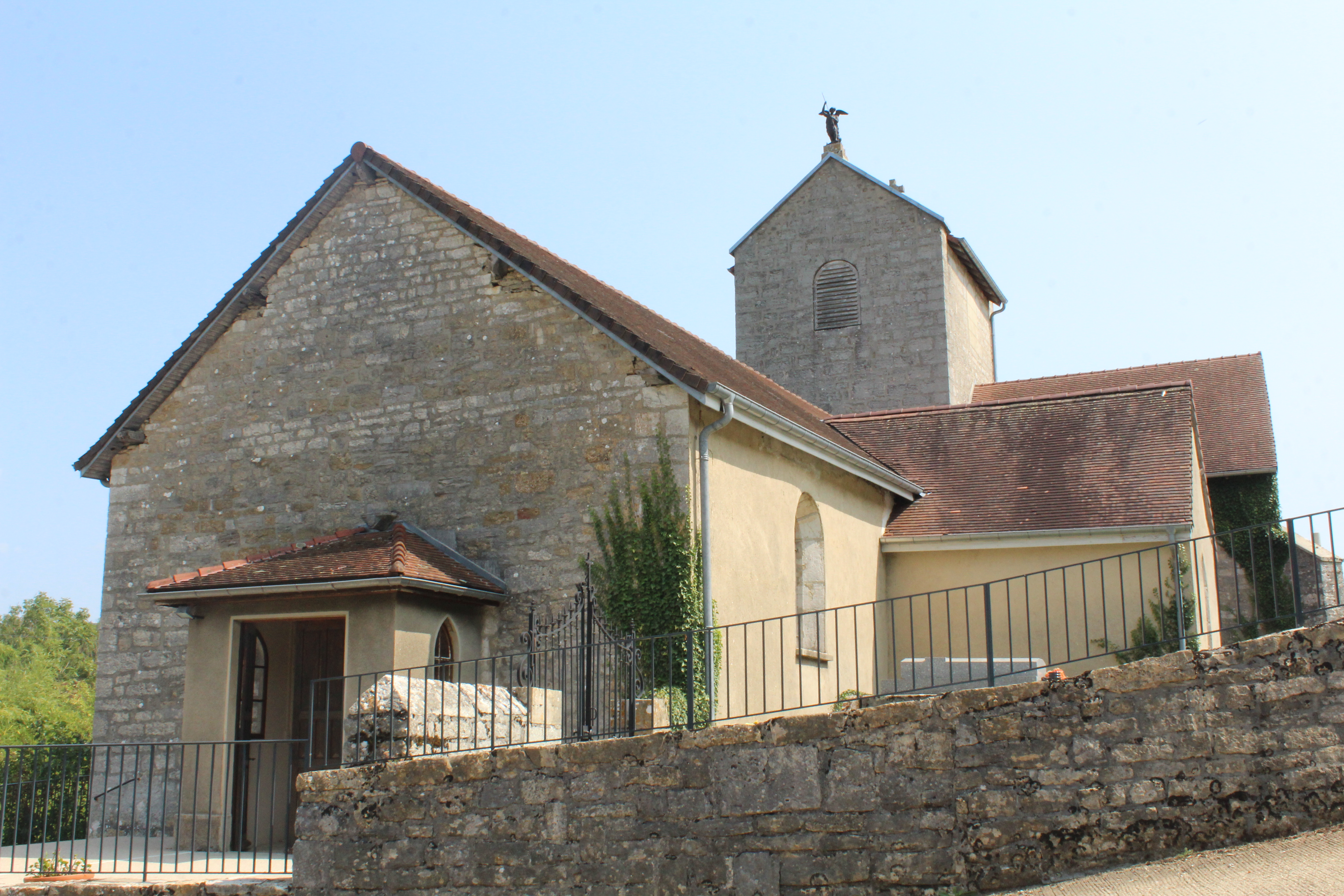 Église Saint-Michel de Marnoz.